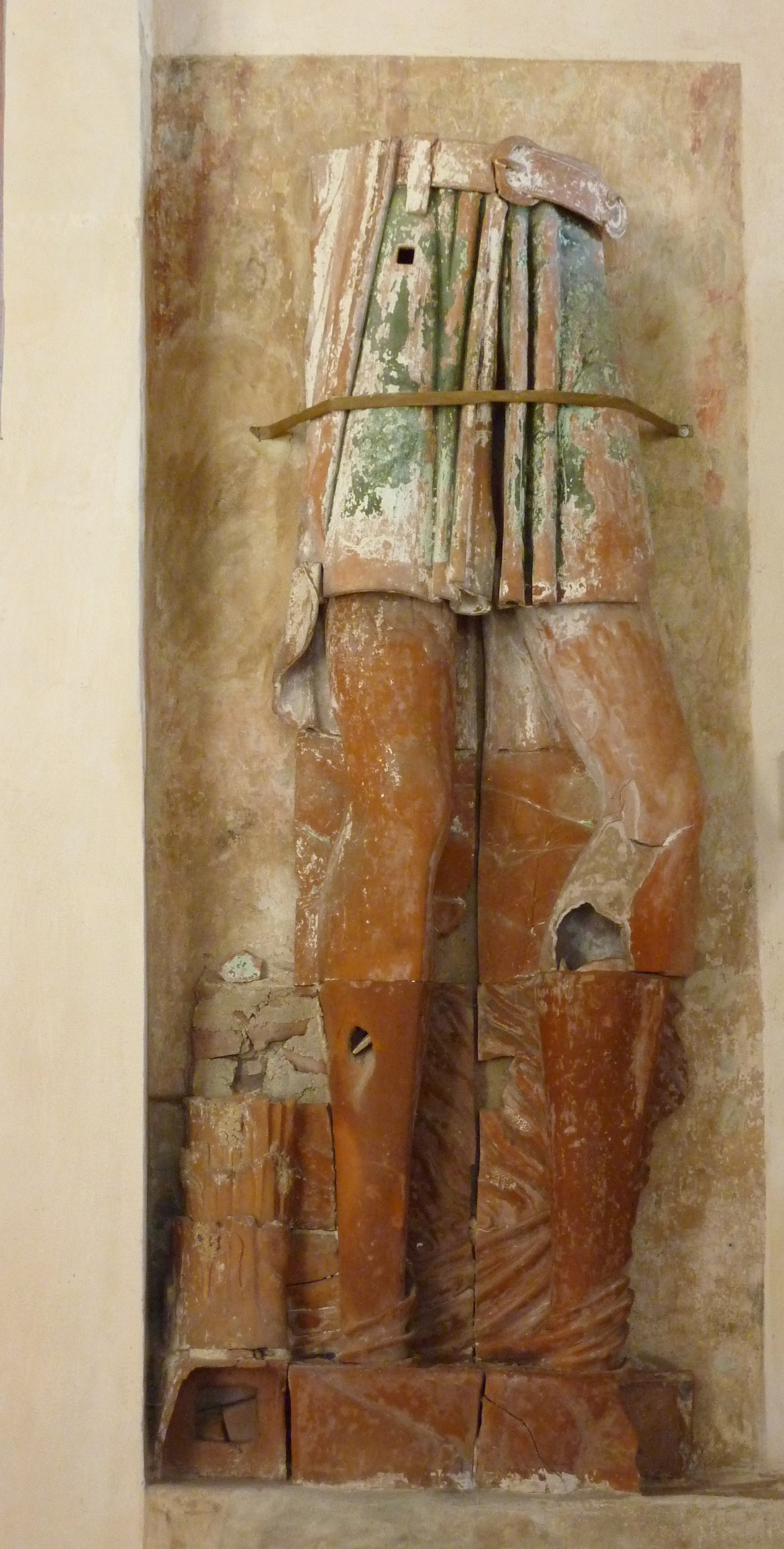 Evangelische Pfarrkirche, ehemalige Benediktinerklosterkirche St. Maria in Auhausen im Landkreis Donau-Ries (Bayern), unterer Teil (2,86 m) einer Tonfigur des hl. Christophorus von 1450/60